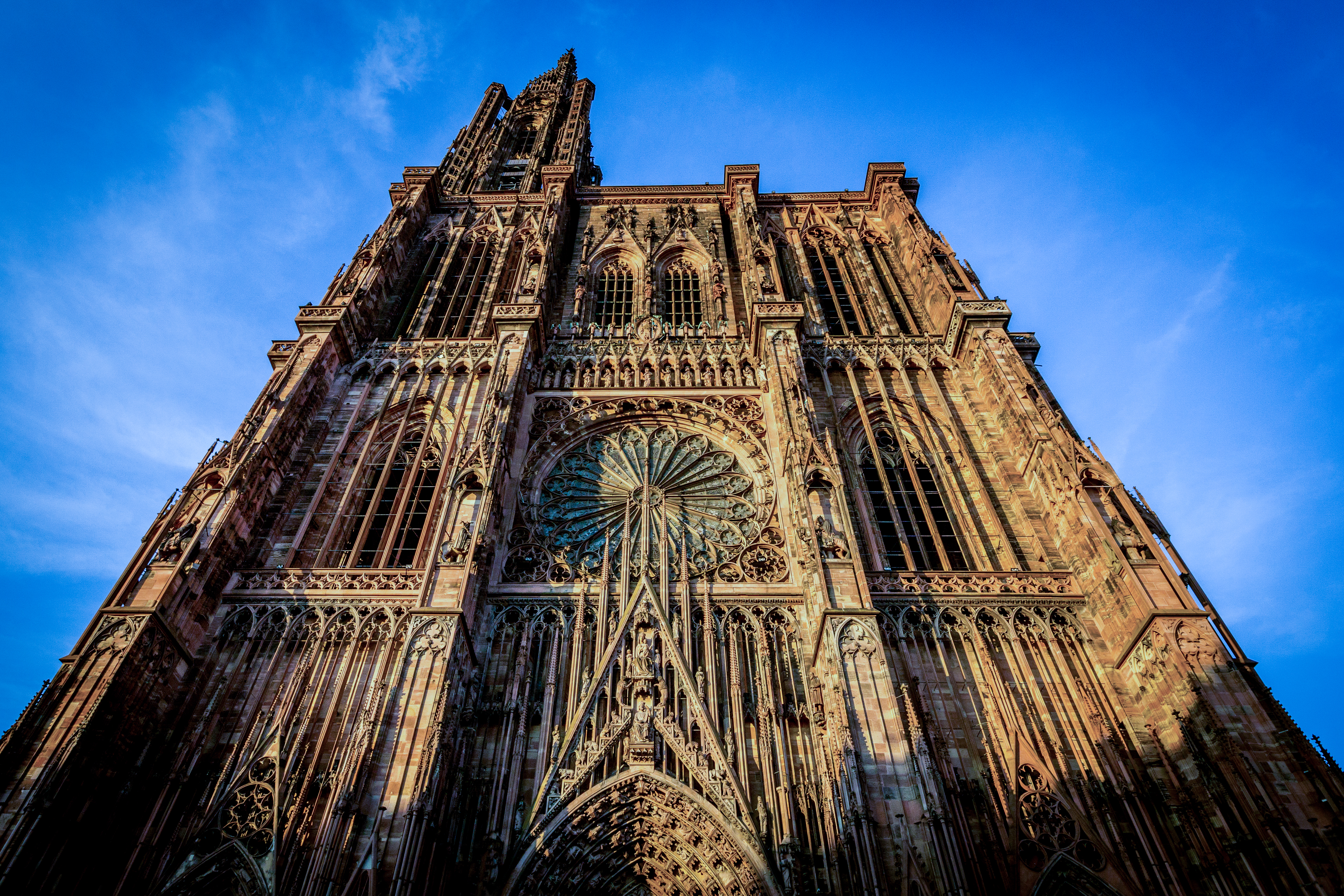 Façade occidentale de la Cathédrale Notre-Dame de Strasbourg